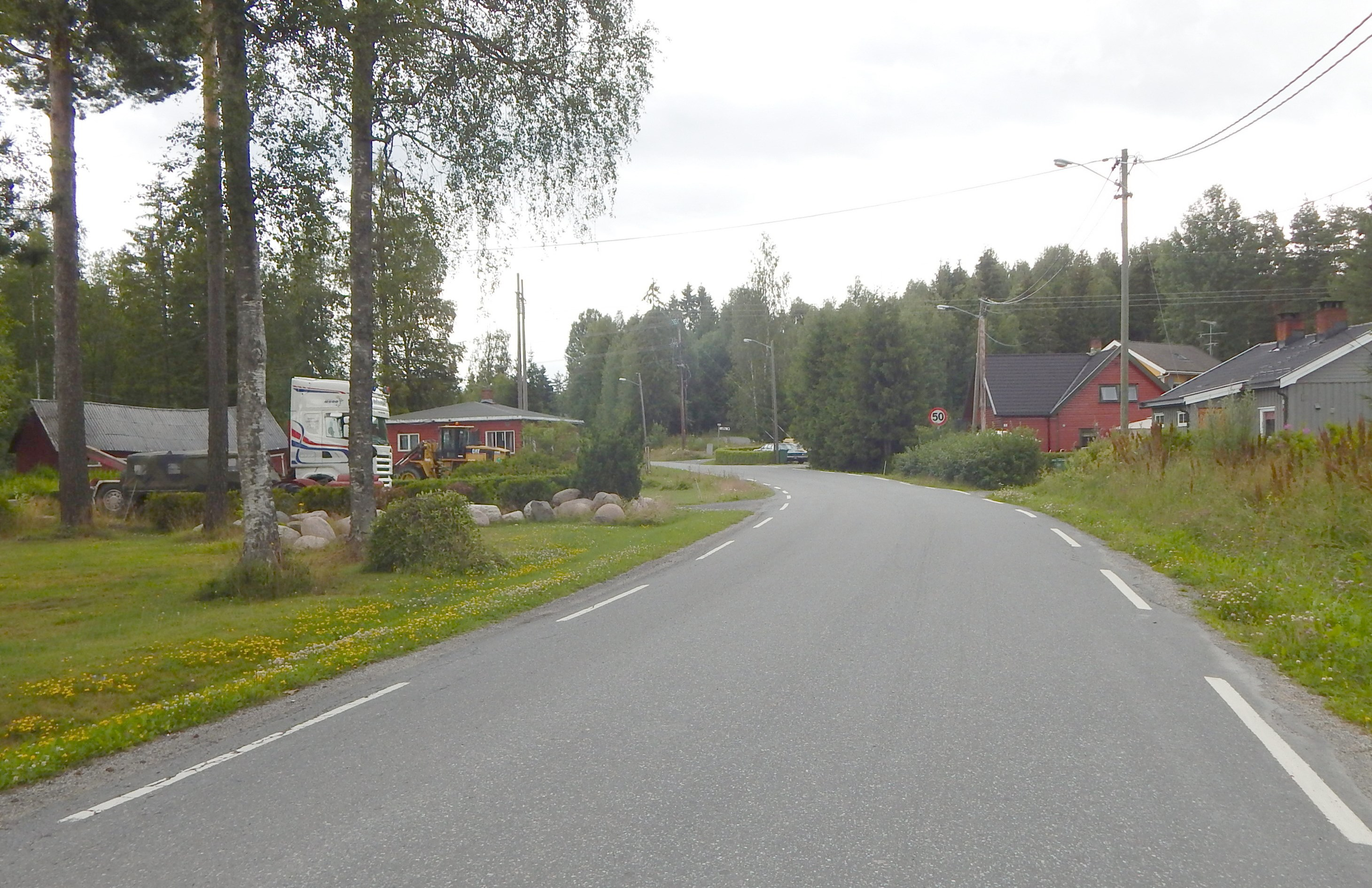 Lokshaugveien (fylkesvei 237)